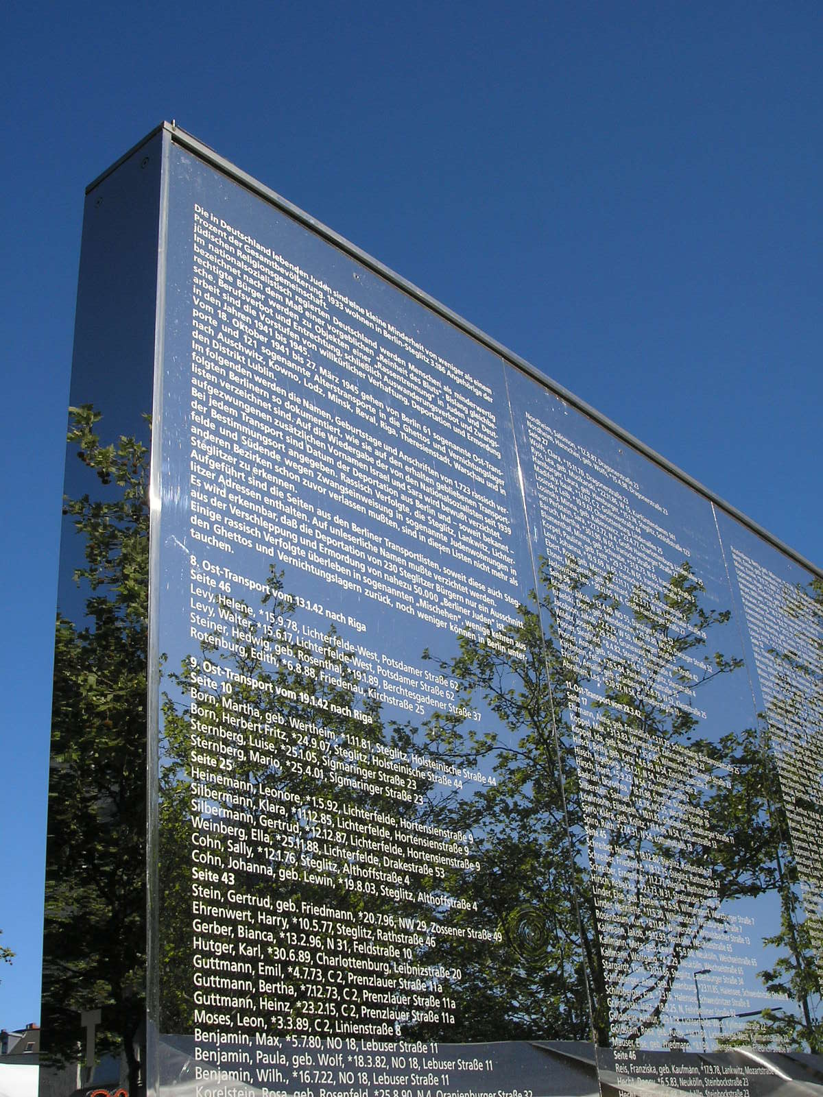 Spiegelwand / Denkzeichen in Steglitz, Holocaust memorial to the victims from Steglitz, Berlin.